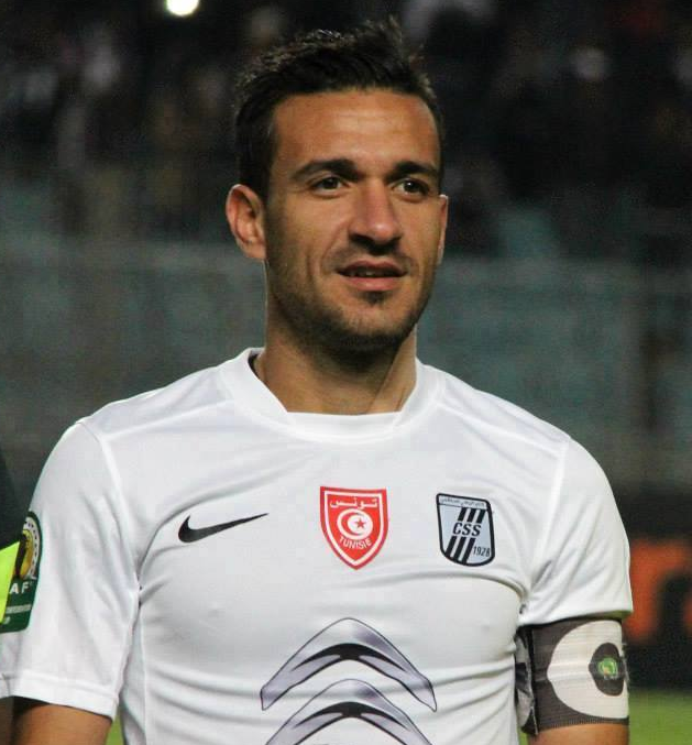 Ali Maaloul